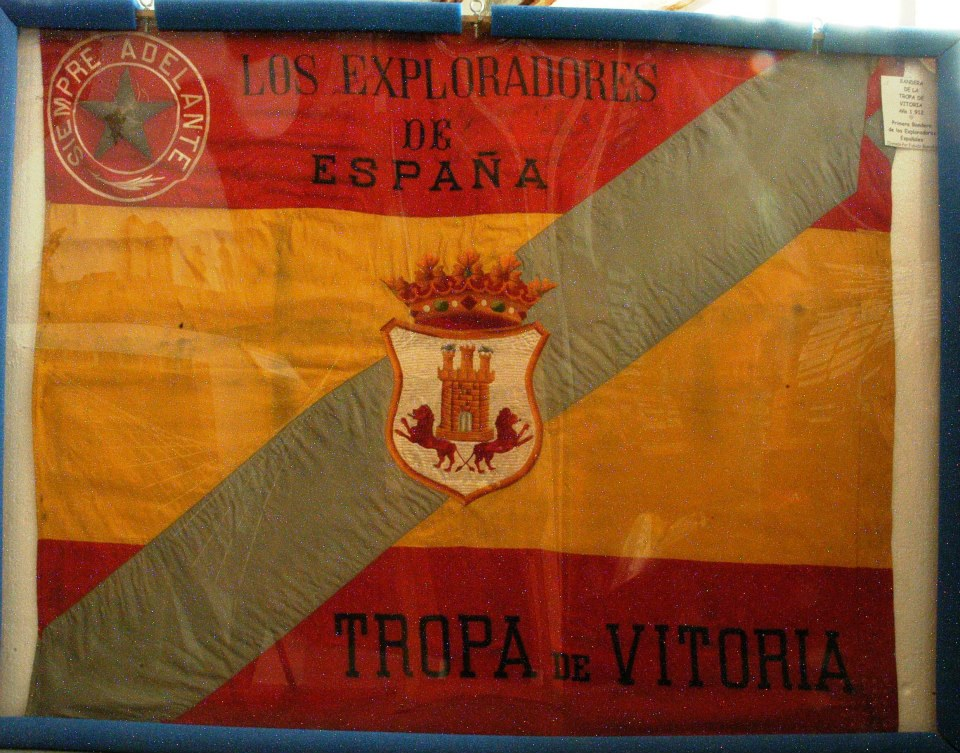 Bandera de la Tropa de Vitoria de los Exploradores de España. La Tropa de Vitoria está considerada la primera de la institución.